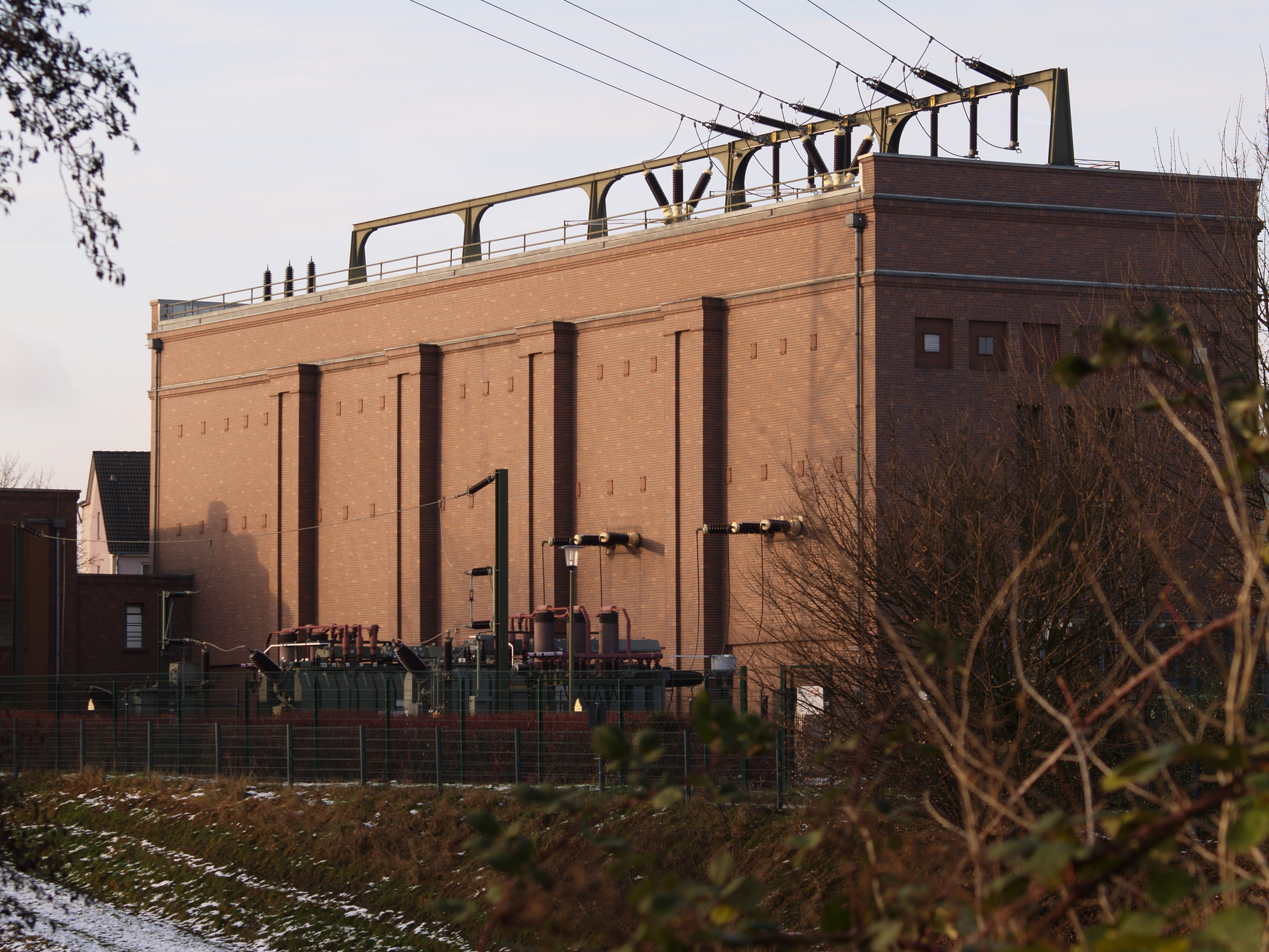 Tranformerstation at Recklinghausen, working side